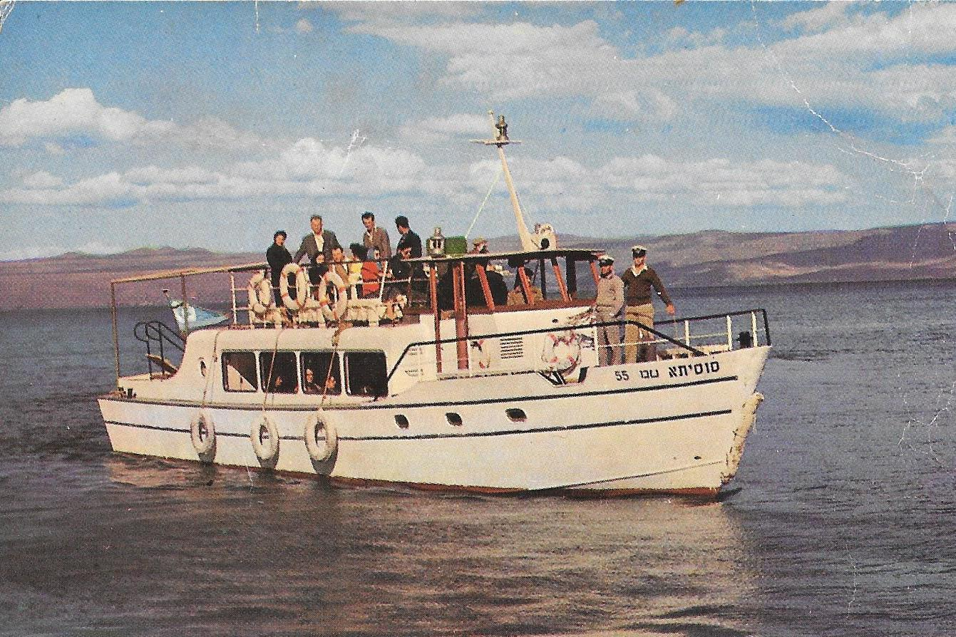 קציני מספנת חיל הים בשיט על ספינת הטיולים סוסיתא בכנרת